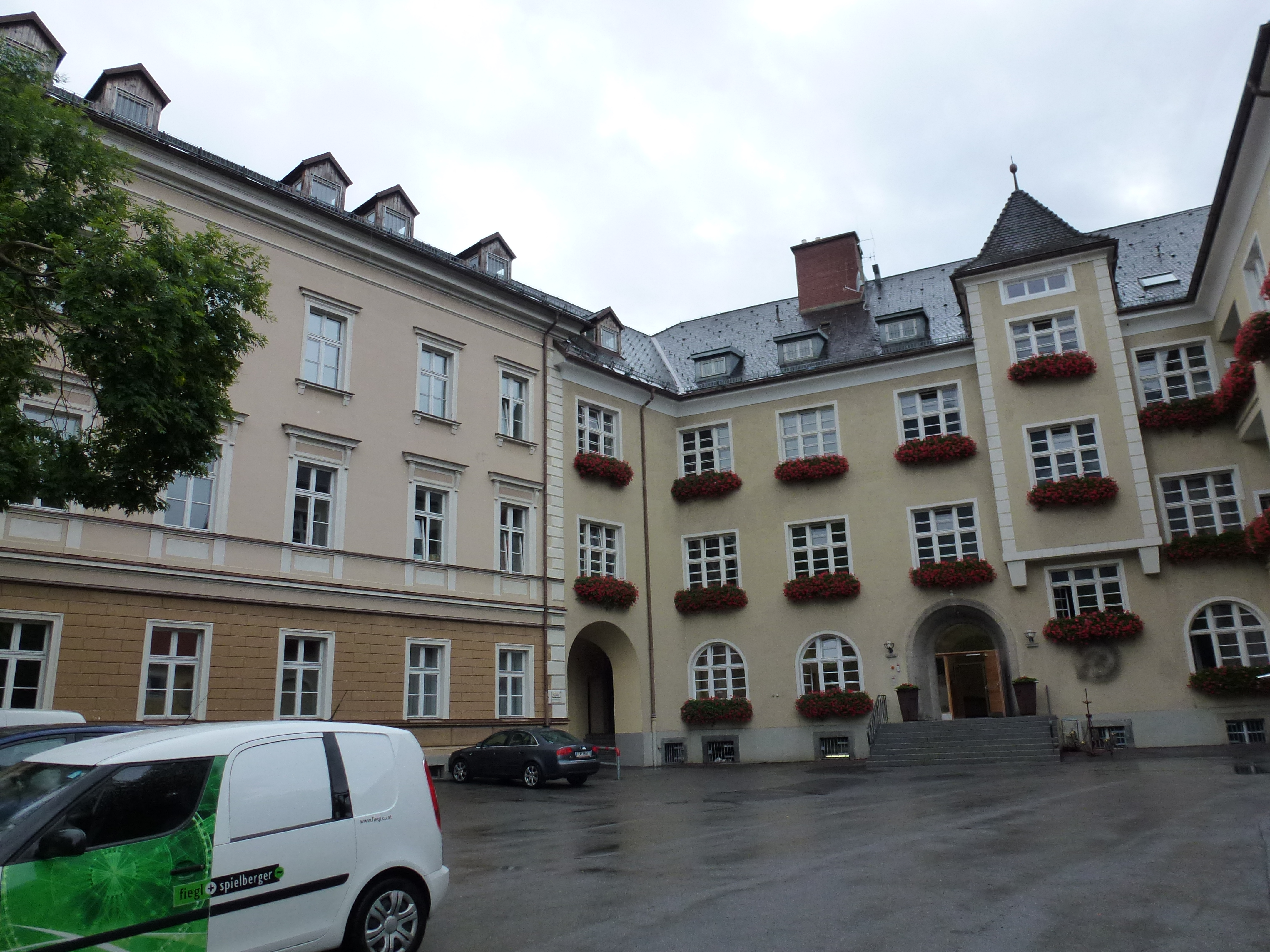 Landwirtschaftliche Landeslehranstalt Imst samt Erweiterungsbau - Meraner Straße 6, Imst